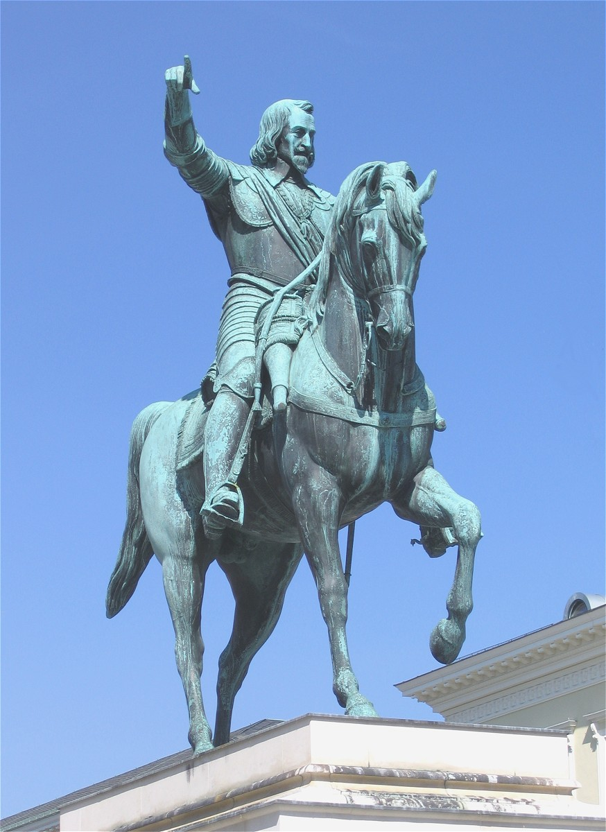 Reiterstandbild Kurfürst Maximilian I., geschaffen von Bertel Thorvaldsen, auf dem Wittelsbacherplatz in München